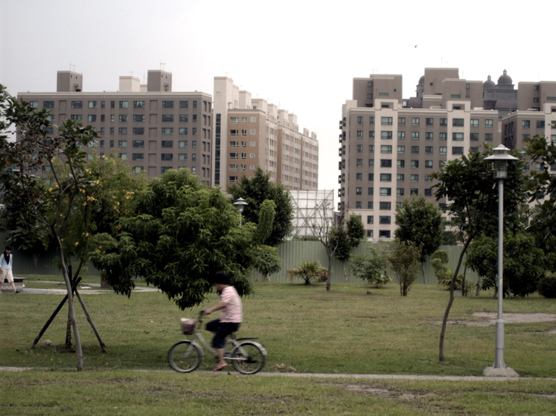 桃園縣中壢市內壢元生重劃區。